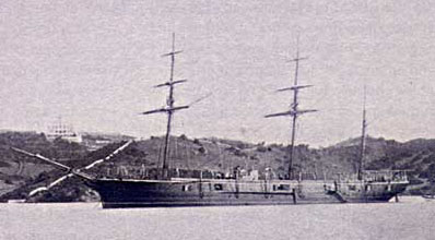 Corbeta Tornado